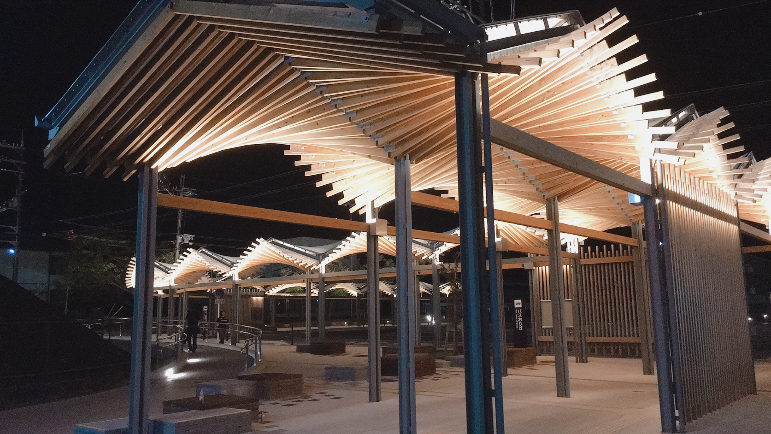 2019年9月26日21:58頃堅田駅西口にて撮影